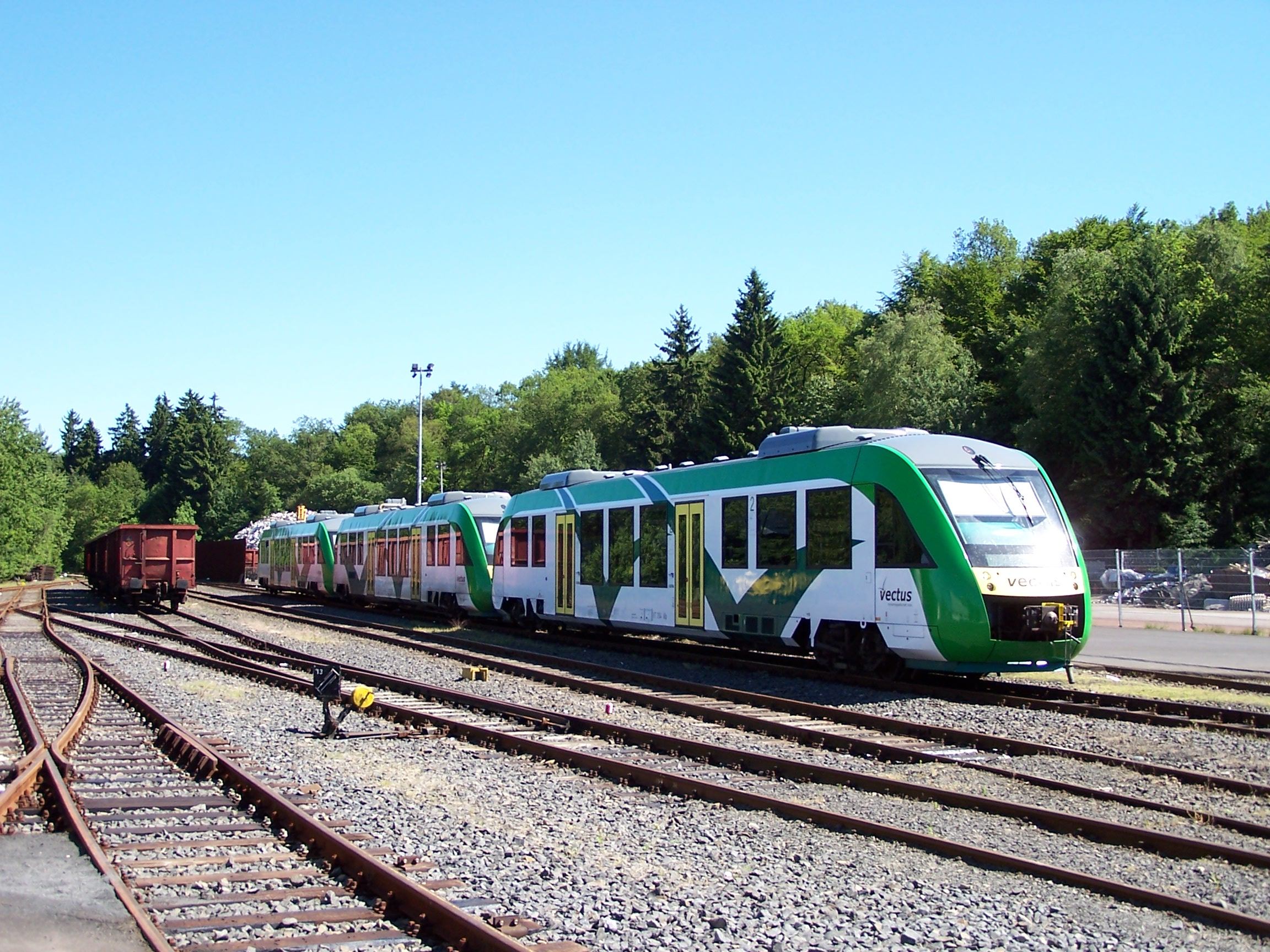 Triebwagen im Bahnhof Steinebach-Bindweide